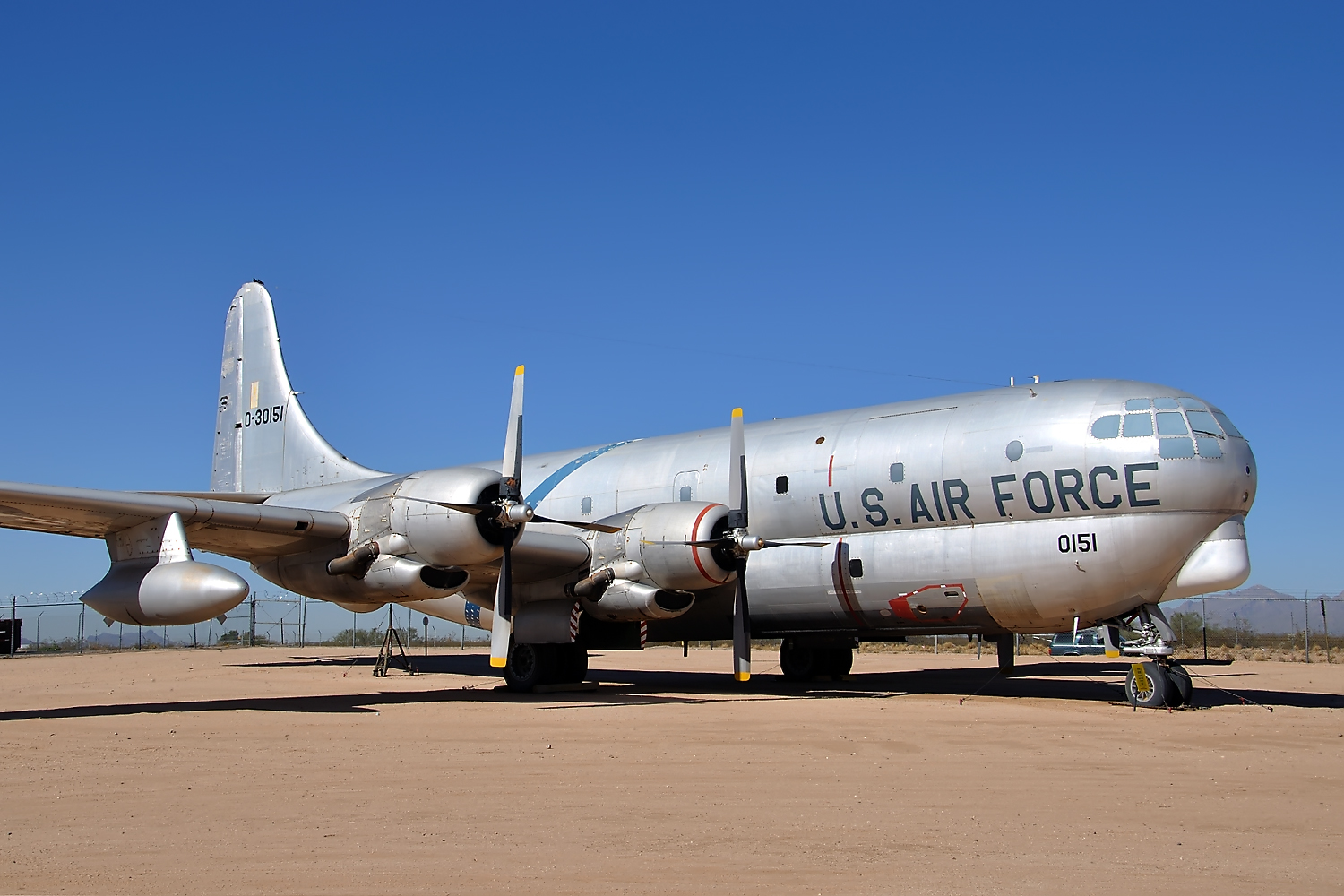 53-0151 Boeing KC-97G Stratofreighter